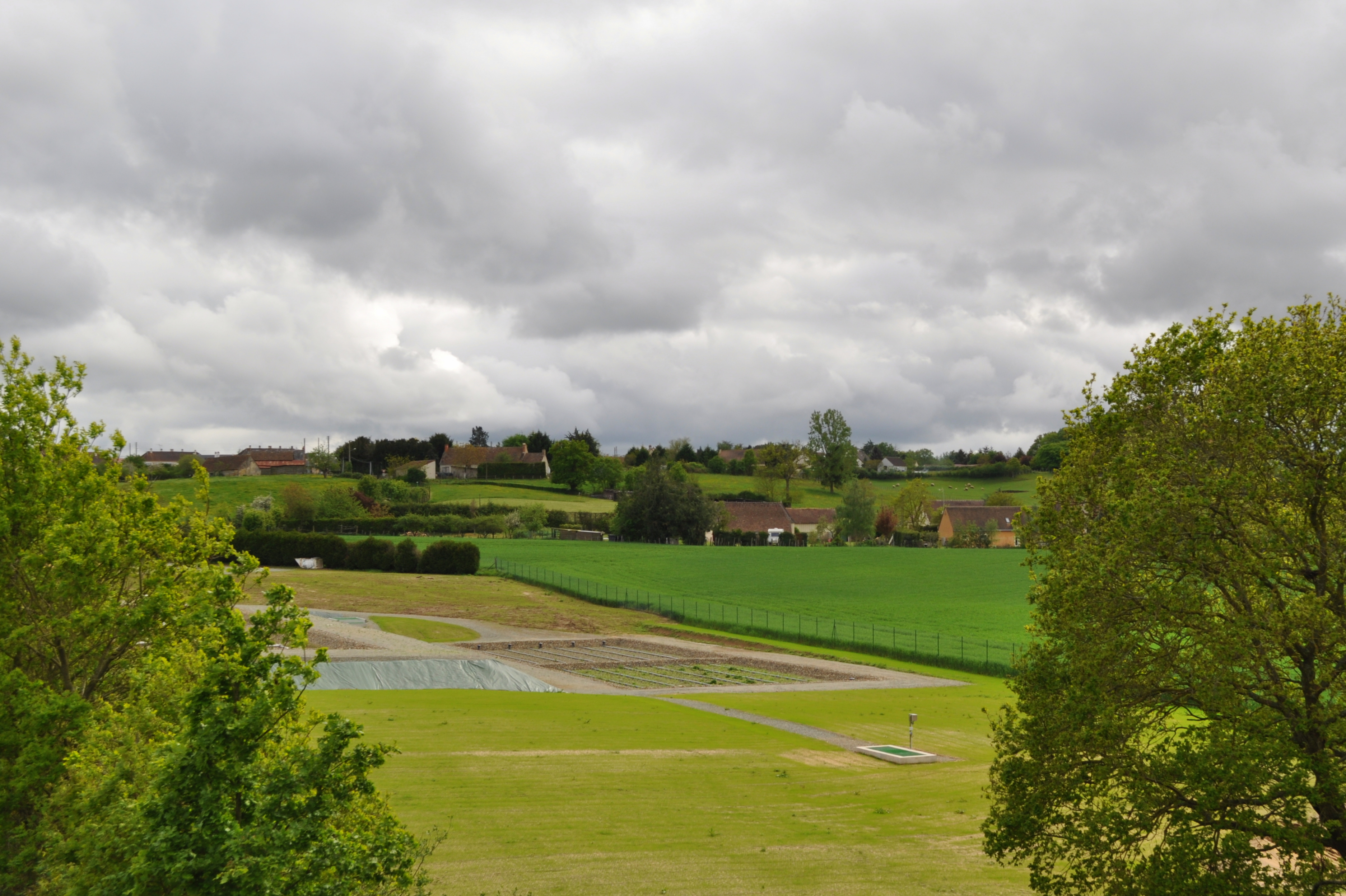 Vue générale de Saint-Jean-du-Bois (Sarthe)